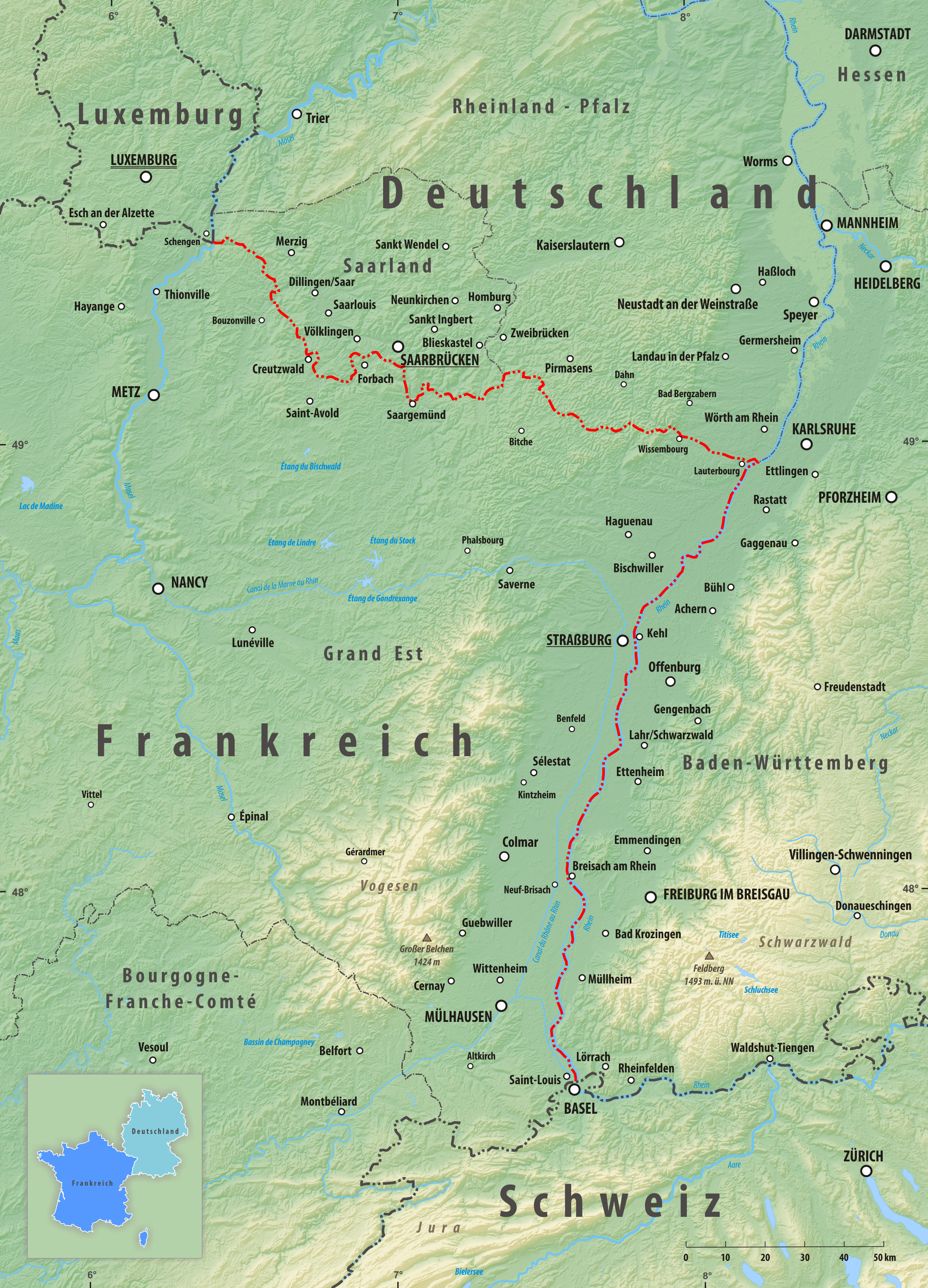 Reliefkarte des Grenzverlaufes zwischen Deutschland und Frankreich Topographischer Hintergrund: NASA Shuttle Radar Topography Mission (public domain). SRTM3 v.2.